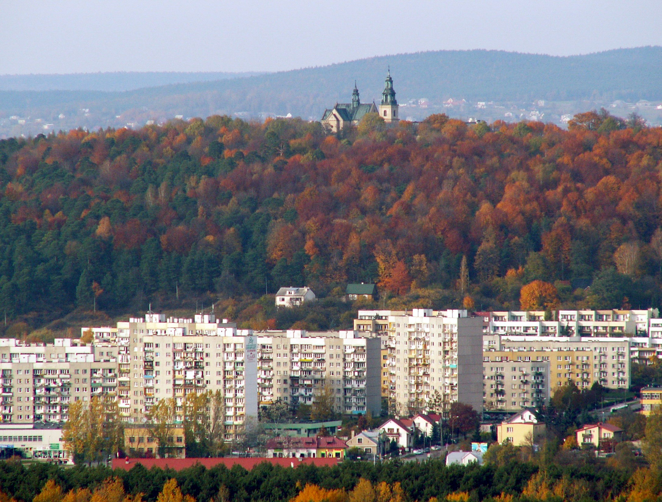 Karczówka (wzniesienie w Kielcach)